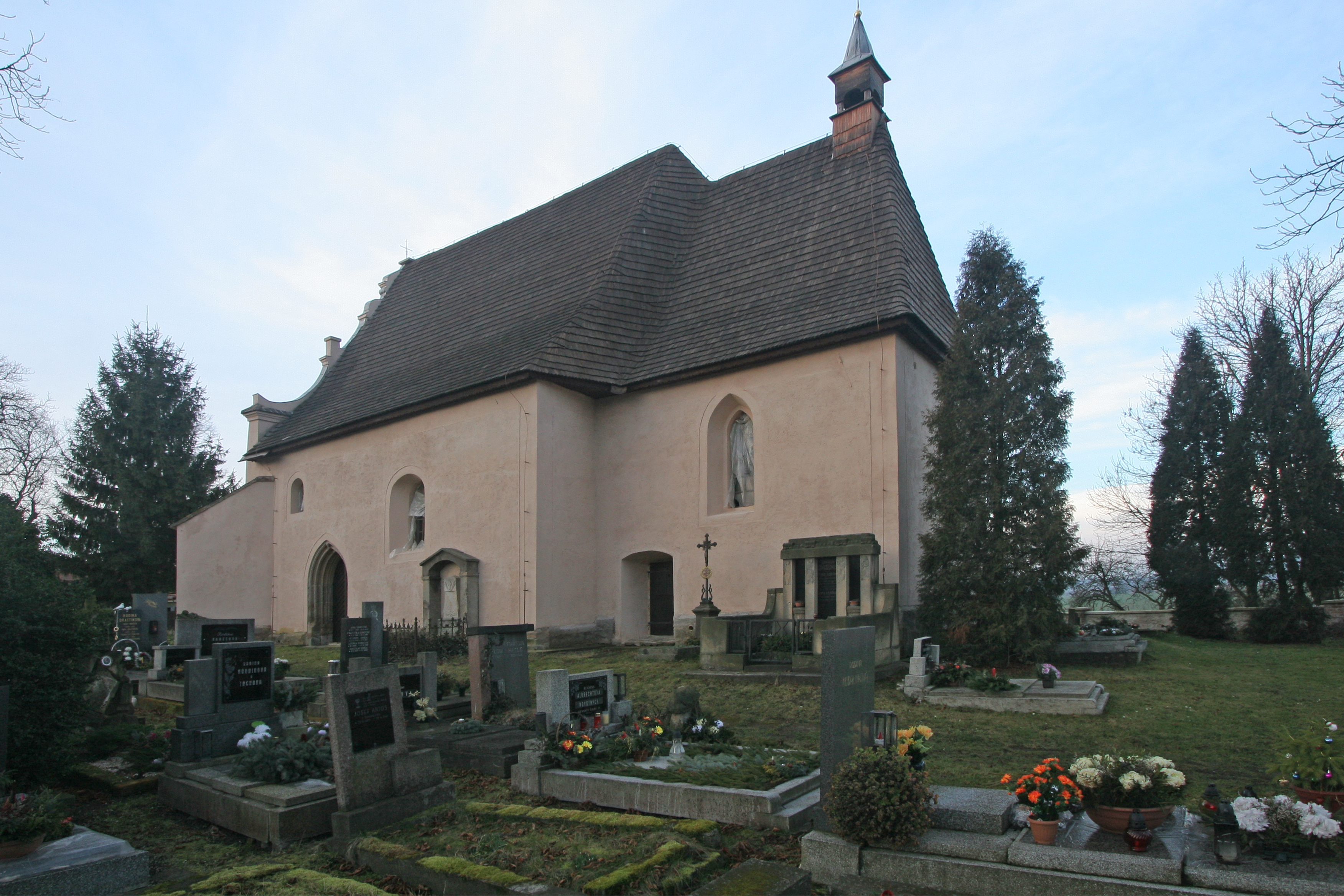 Kostel sv. Mikuláše (Lískovice), Lískovice